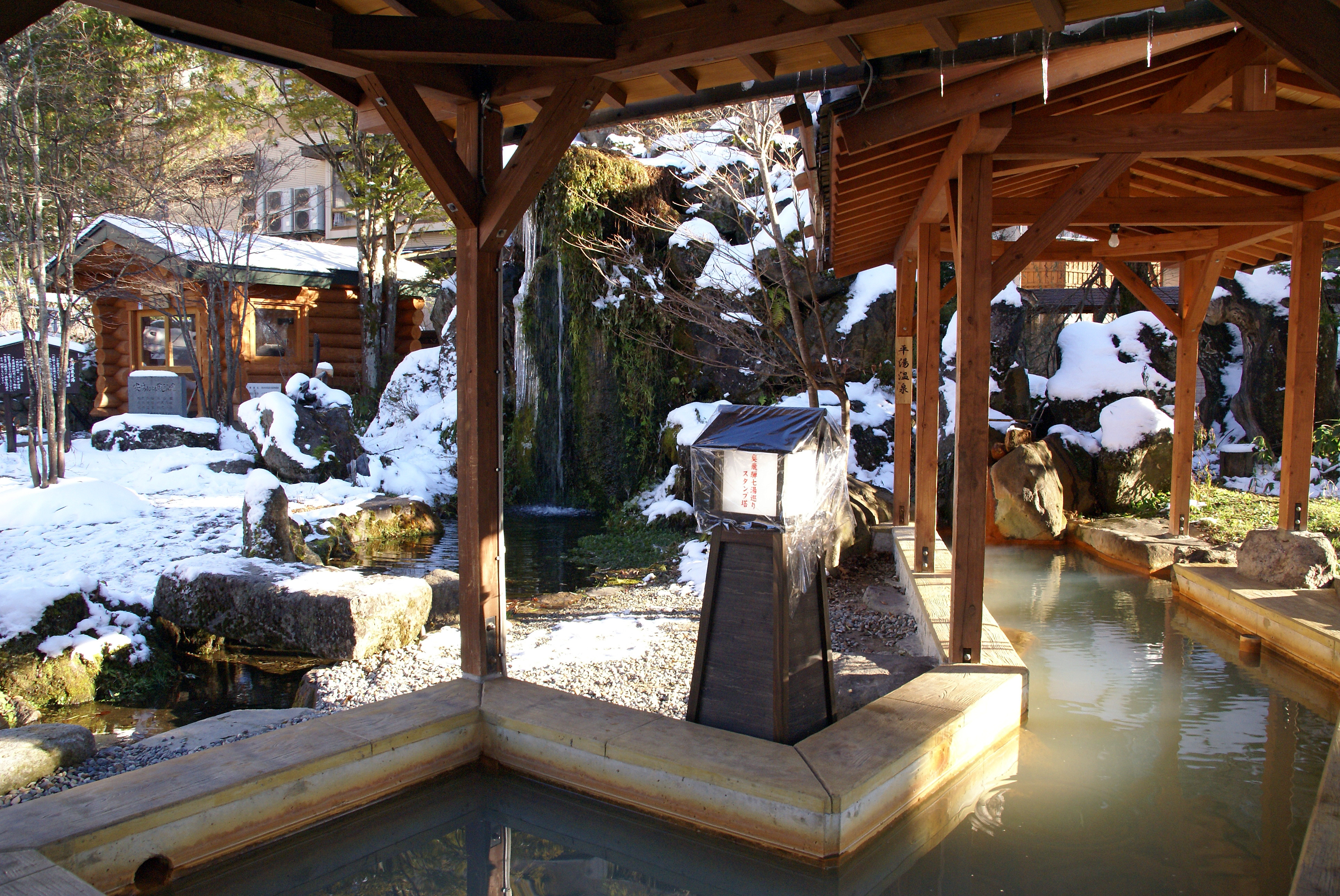 Hirayu Onsen in Takayama, Gifu prefecture, Japan